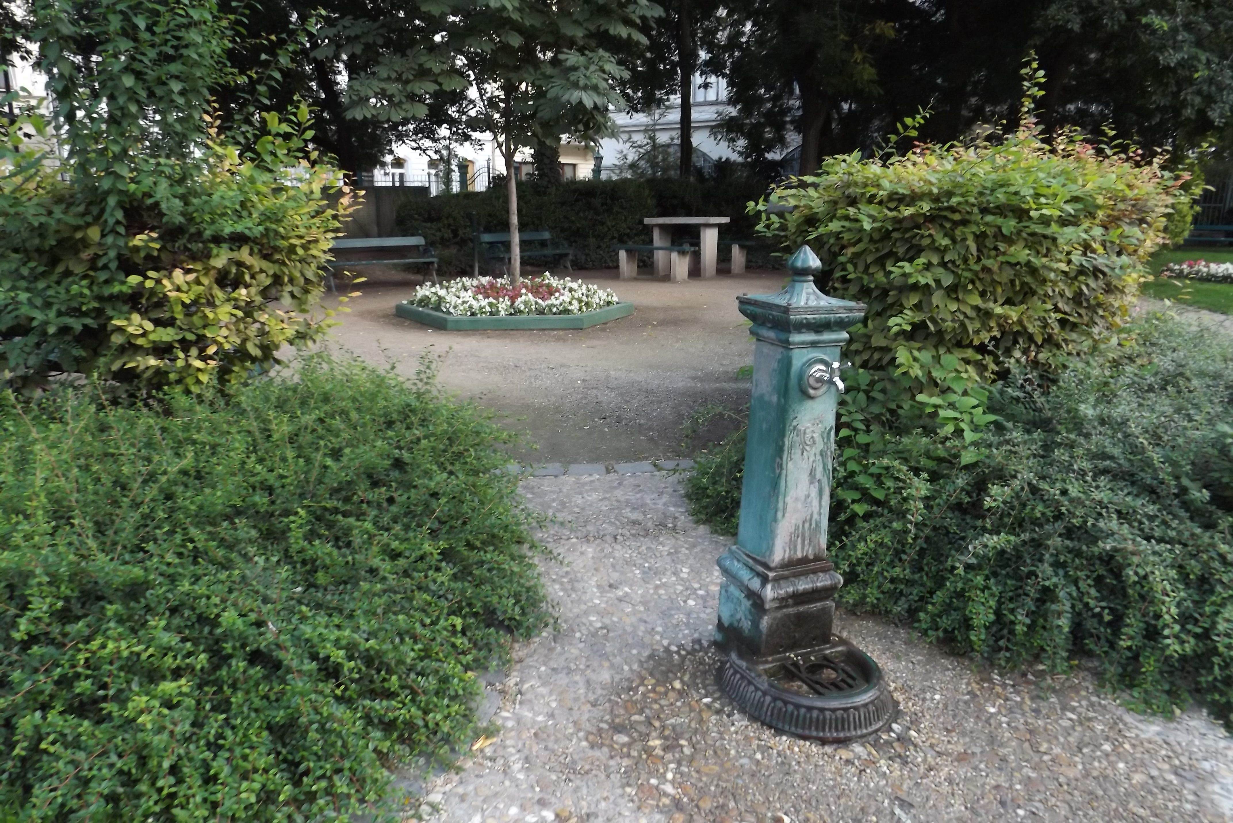 A budapesti Károlyi-kert 2014 augusztusában (Budapest, V. ker.)